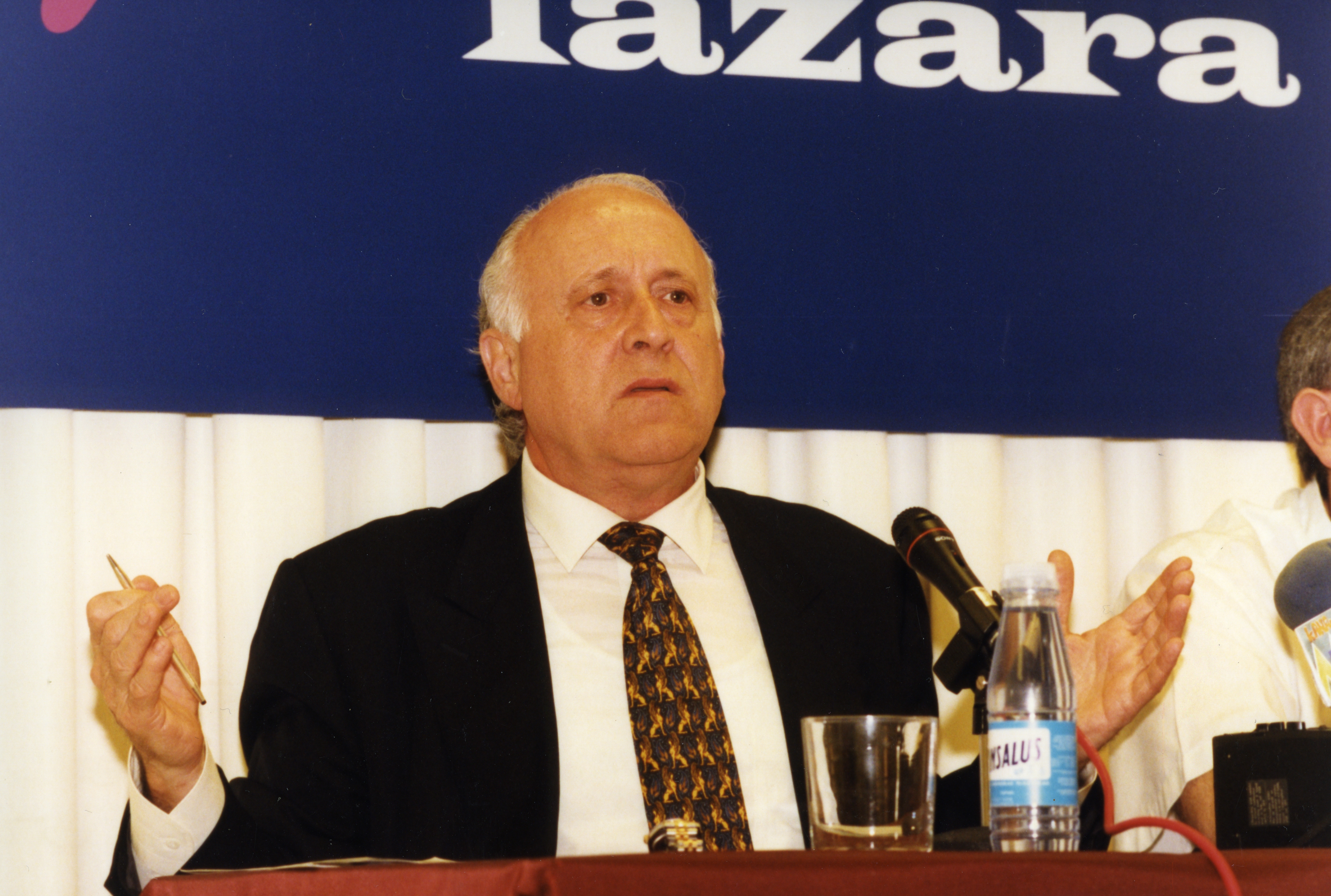 Politika Plazara hitzaldian. Aiurri 39 zbk. 14. orr.